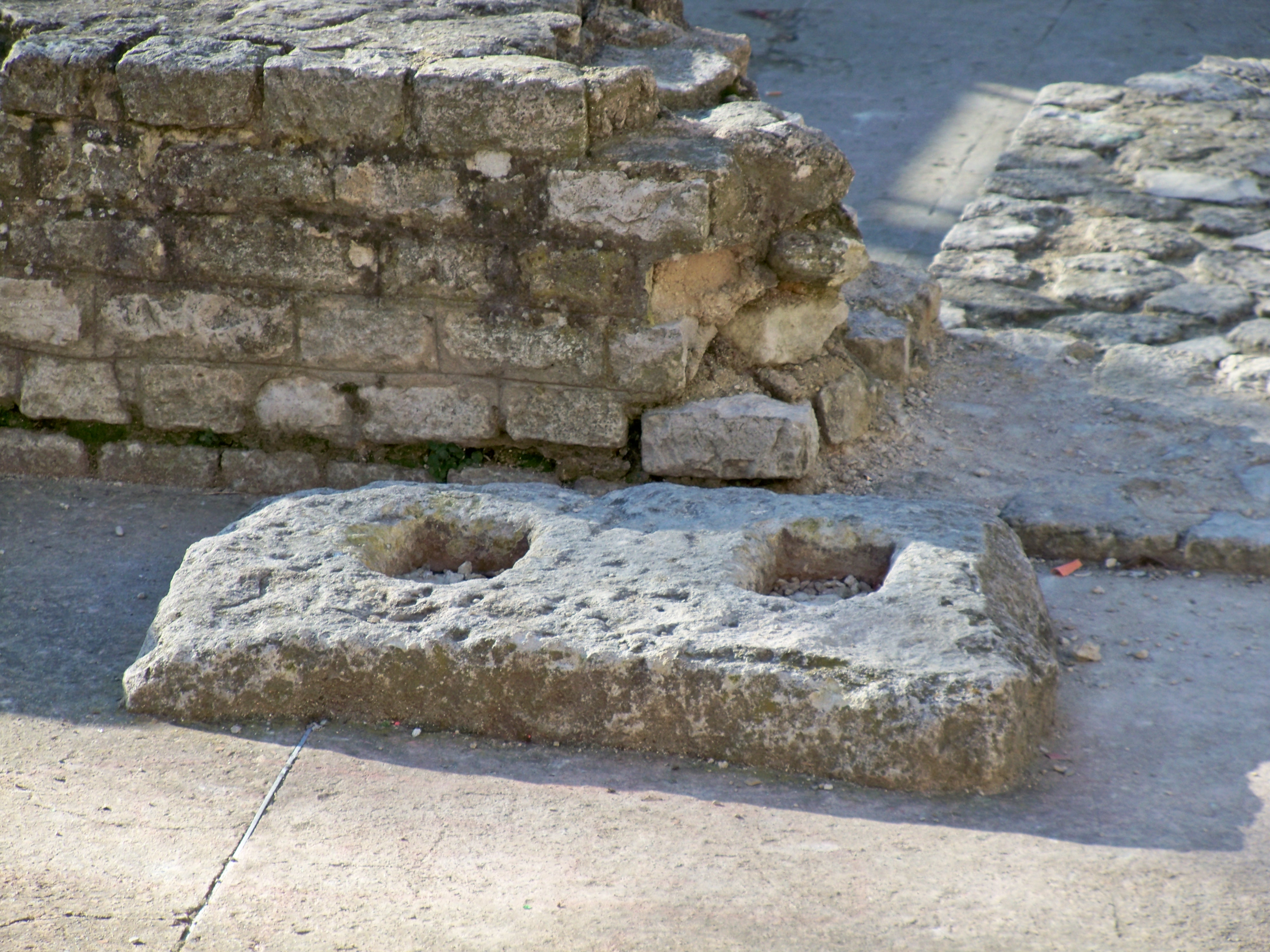 ruines à Apt (Vaucluse, France)